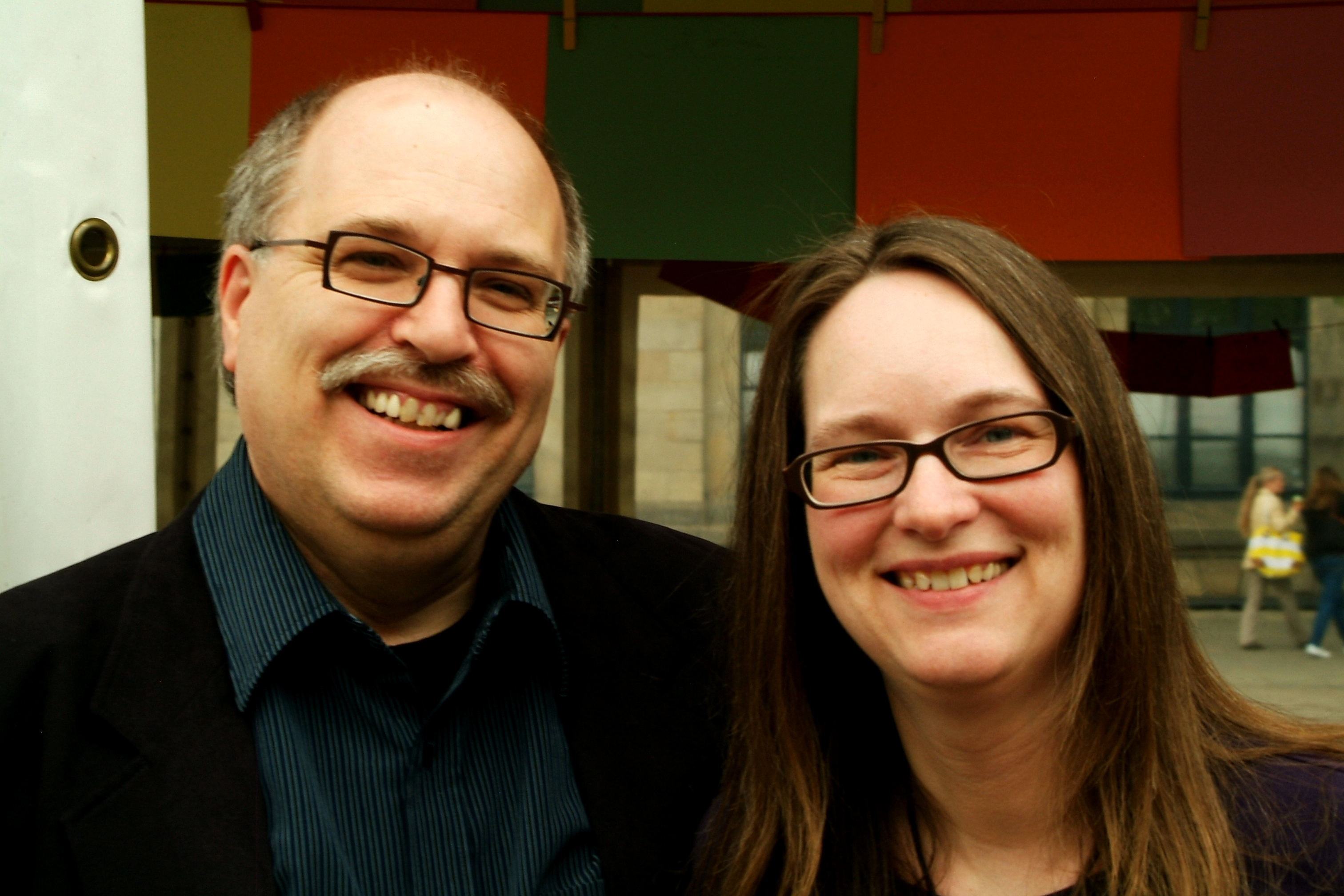 Gedenkveranstaltung zum 79. Jahrestag der Bücherverbrennungen in Hannover. Unter der Erkenntnis "... dort, wo man Bücher verbrennt, verbrennt man am Ende auch Menschen" fanden durch die Inititative "Hannover im Wort" verschiedene Veranstaltungen statt, darunter die am Opernplatz mit Lesungen verfolgter Autoren bzw. von Ihnen verbrannter Bücher.